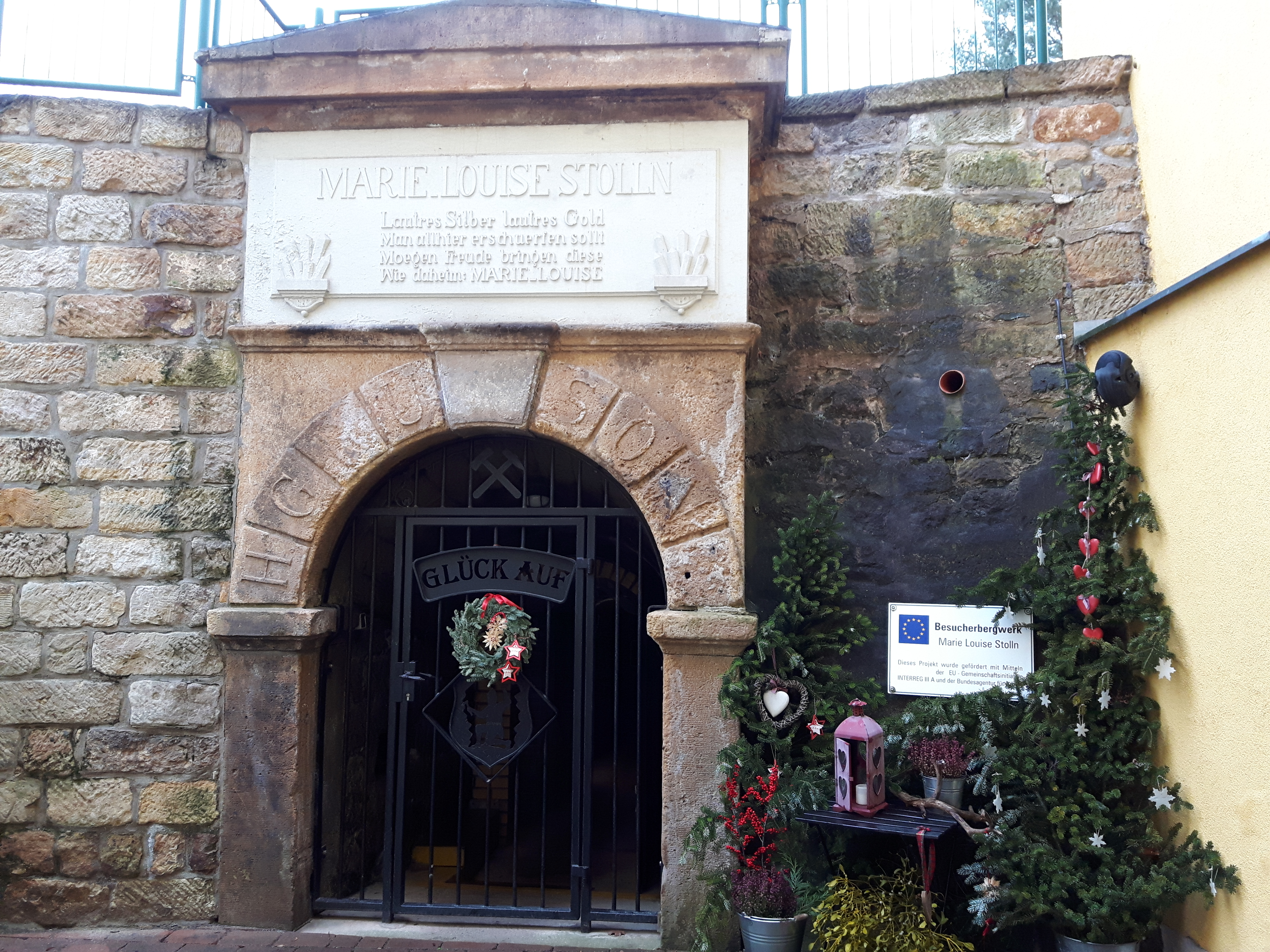 Mundloch zum heute als Besucherbergwerk genutzten Marie-Louise-Stolln in Berggießhübel (Sachsen)